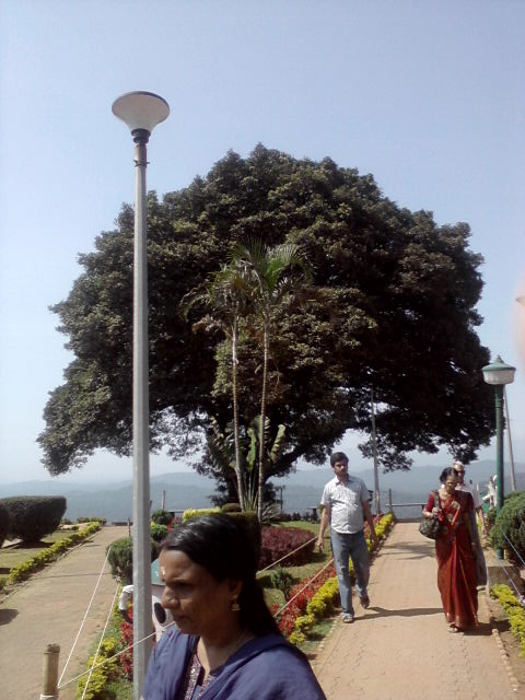 a huge thanni tree (Terminalia bellirica) at rajaseat